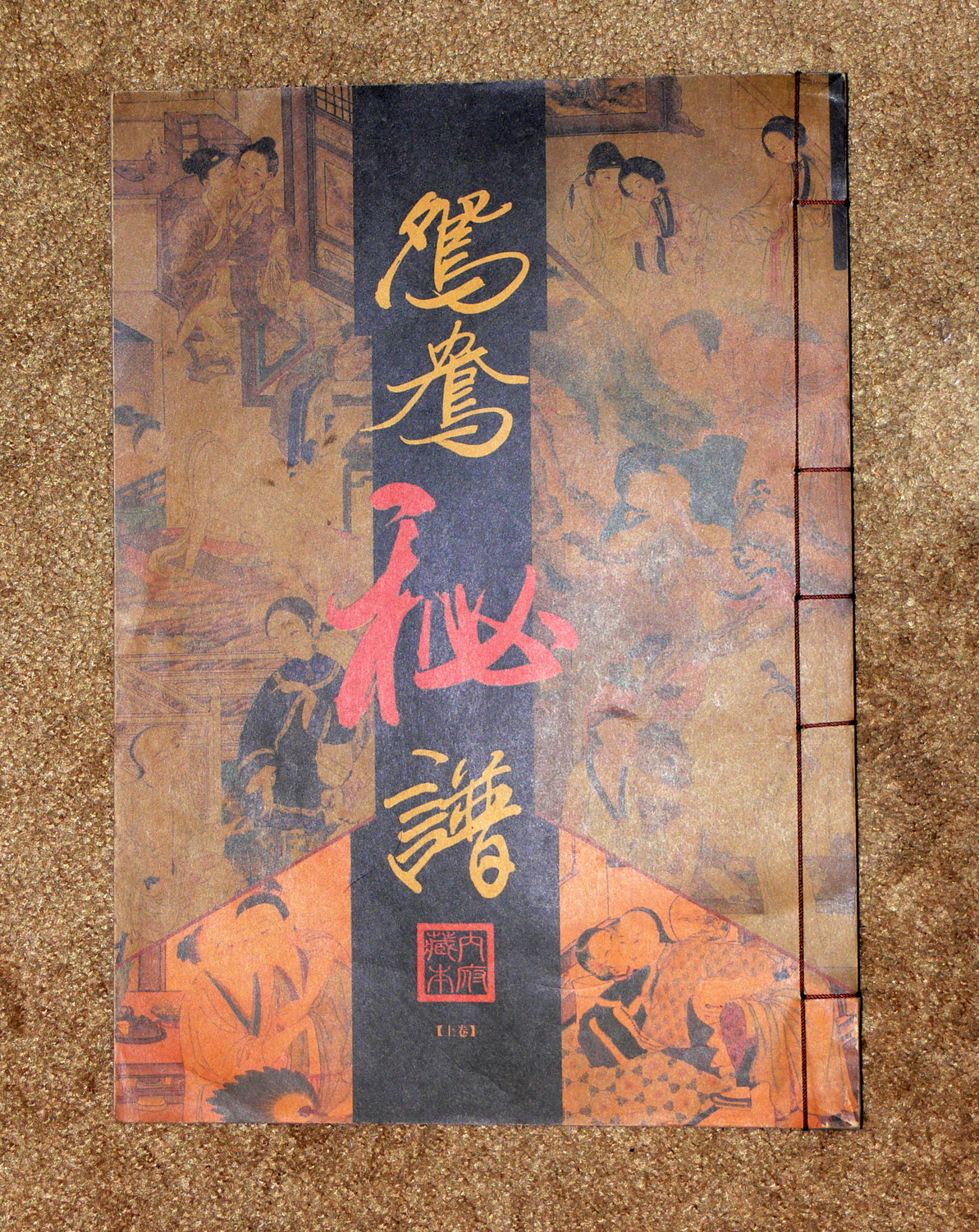 《鸳鸯秘谱》